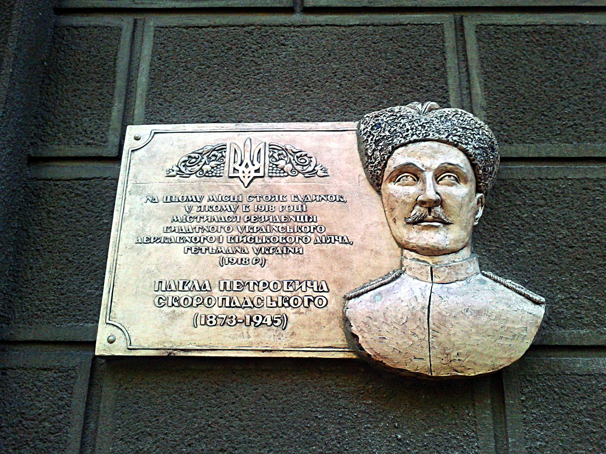 Меморіальна дошка Скоропадському. Другий житловий будинок працівників Ради народних комісарів УРСР, в якому проживали: у 1943–1960 роках П. О. Козицький, композитор; у 1937–1941 роках — Д. С. Коротченко, у 1944–1959 роках — Д. З. Мануїльський, державні і партійні діячі УРСР, Київ, Інститутська вул., 20/8